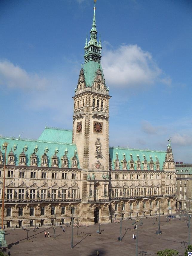 Hamburger Rathaus For similar images, see Hamburger Rathaus.